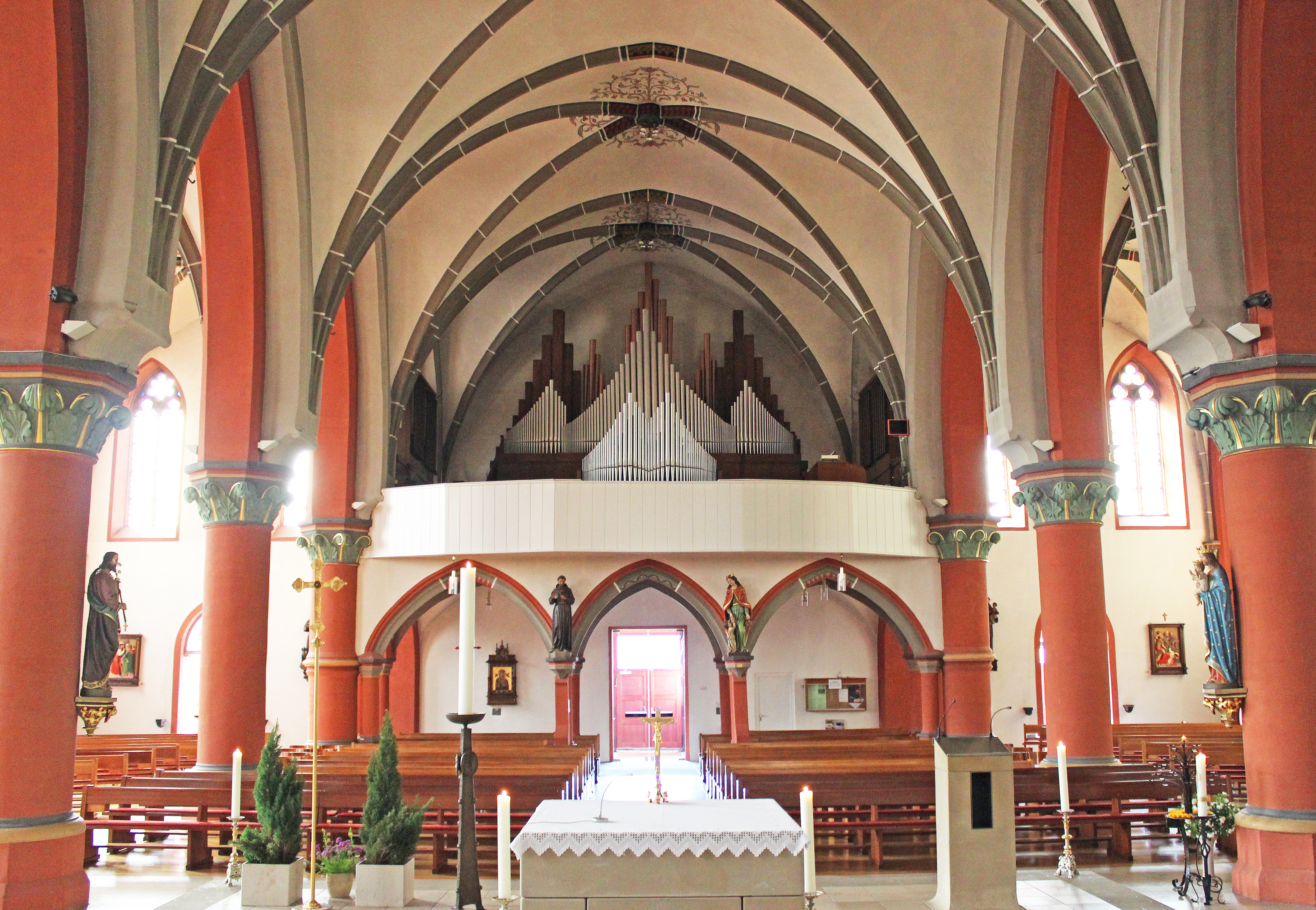 Innenansicht der katholischen Pfarrkirche Mariä Himmelfahrt in Quierschied, Regionalverband Saarbrücken, Saarland